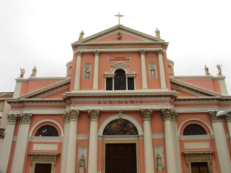 A Basílica da Penha, no Recife, é uma construção em estilo coríntio. As portas principais mostram relevos de cenas bíblicas, esculpidos em madeira. Possui dois torres laterais, finas, em lanceta,e um grande zimbório com claraboia. Arquiteto: Frei Vincenza (1869-1882).